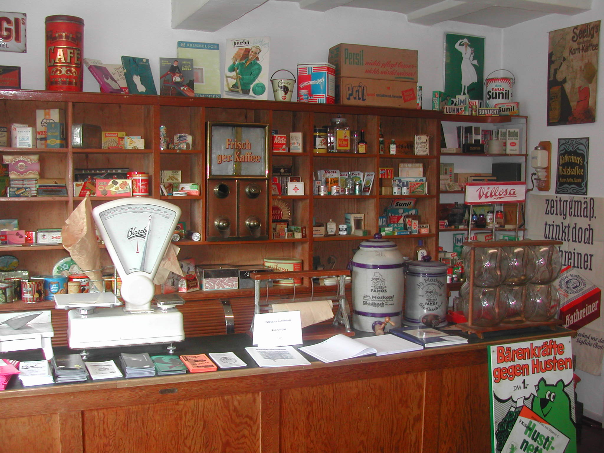 Ladeneinrichtung im Stadtmuseum Bad Berleburg